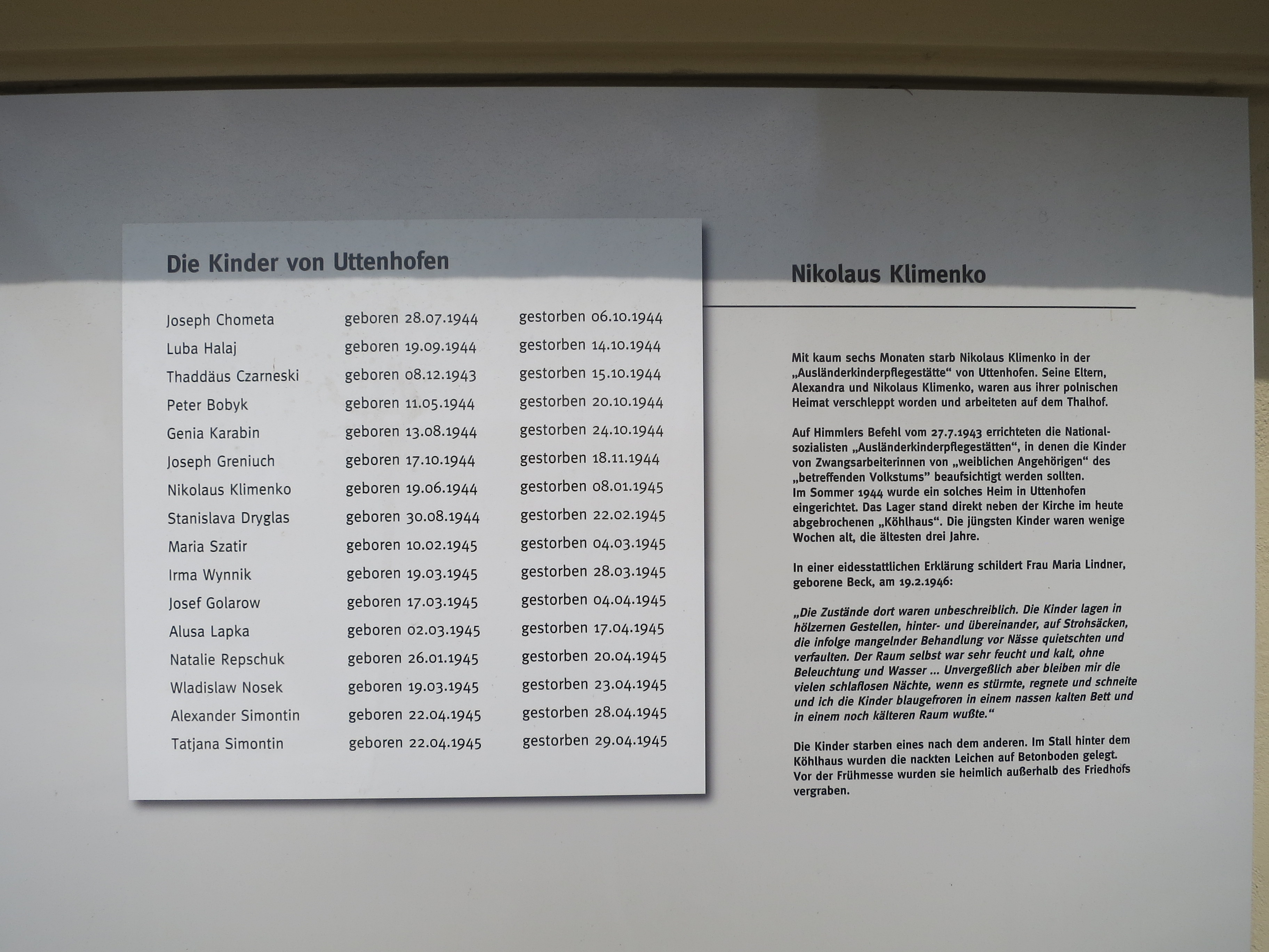 Sie befindet sich an der Südwand des Hauses der Begegnung